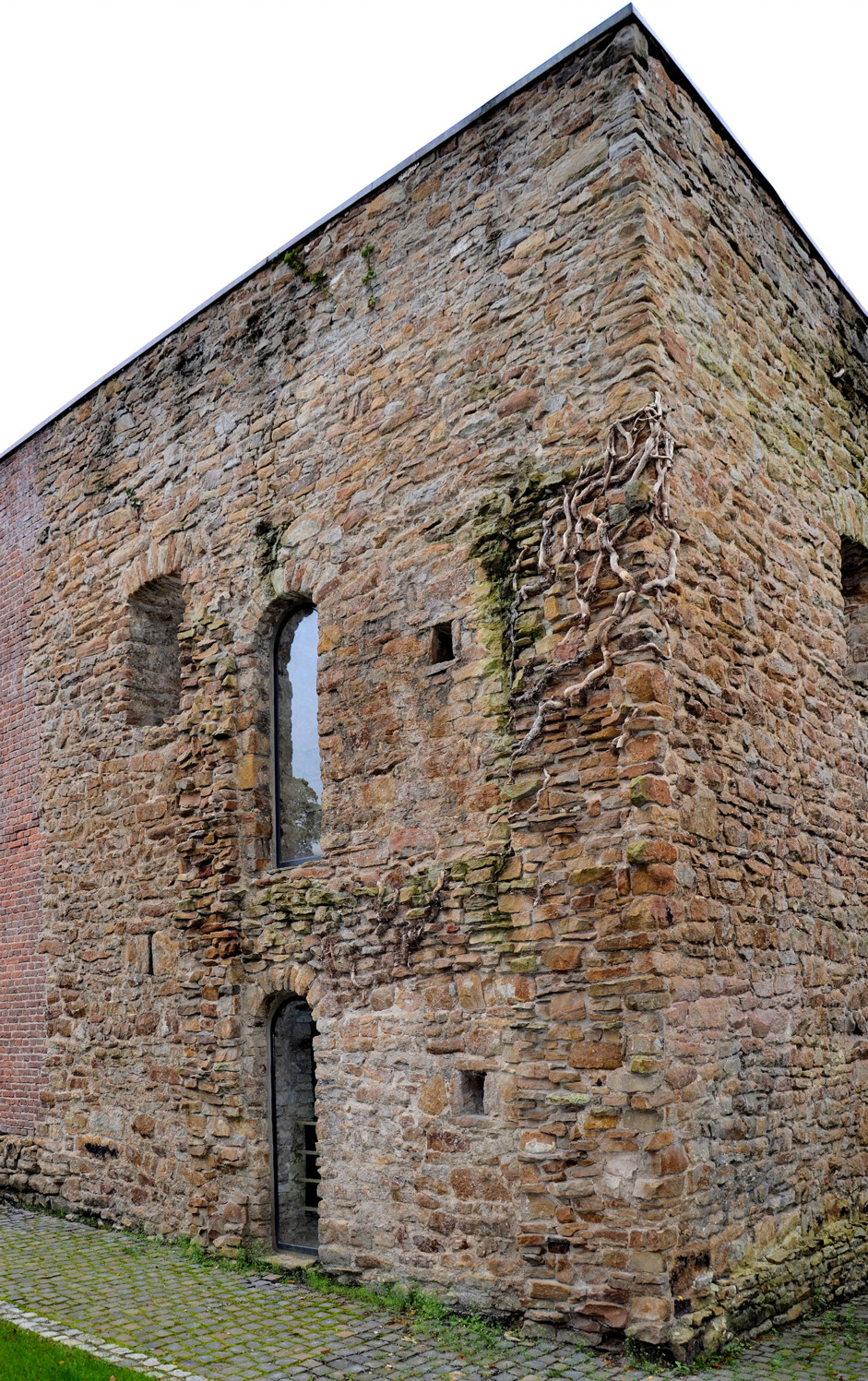 Stenshofturm, Wohnturm aus dem 12. Jahrhundert (Romanisches Haus) in Essen-Rüttenscheid im Grugapark